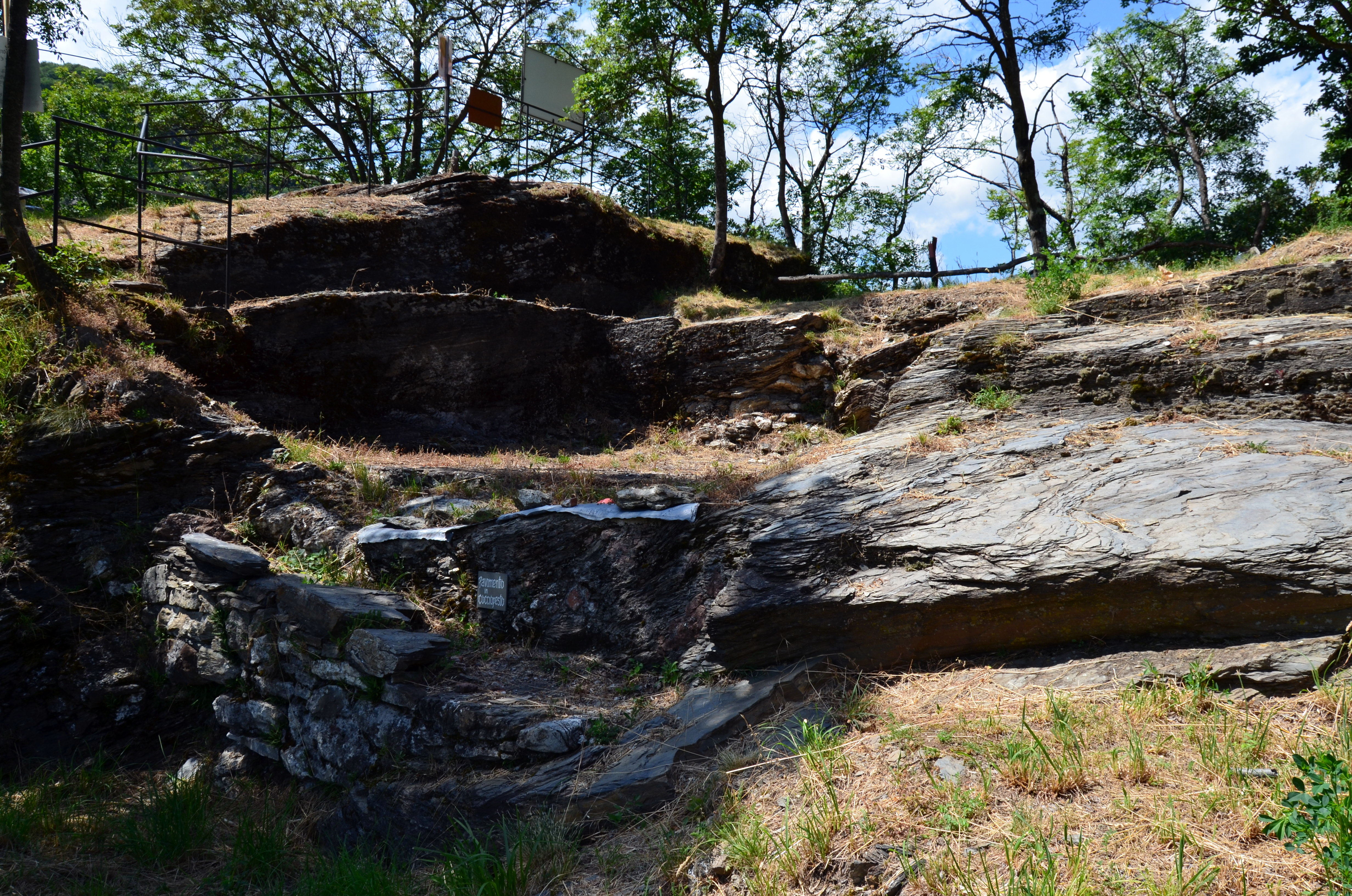 Ruderi del castello dei Fieschi di Roccatagliata, Neirone, Liguria, Italia